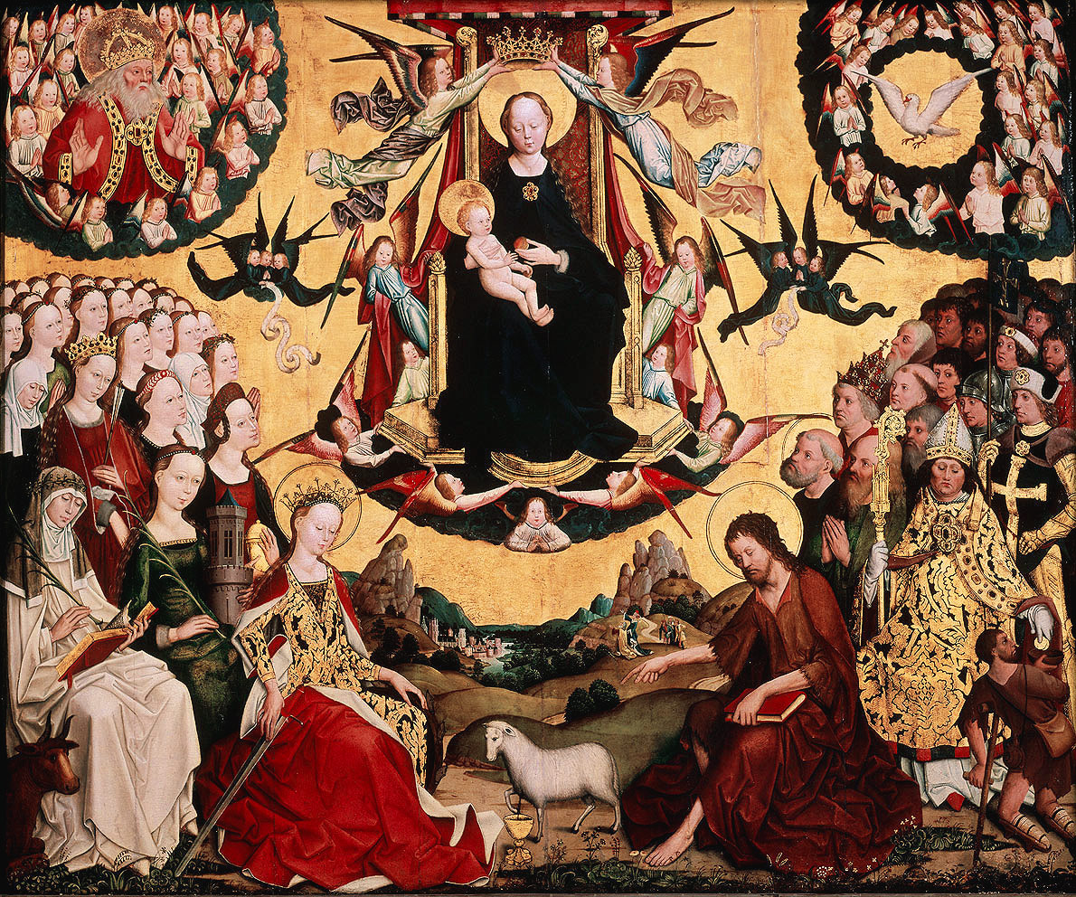 Glorification de Marie